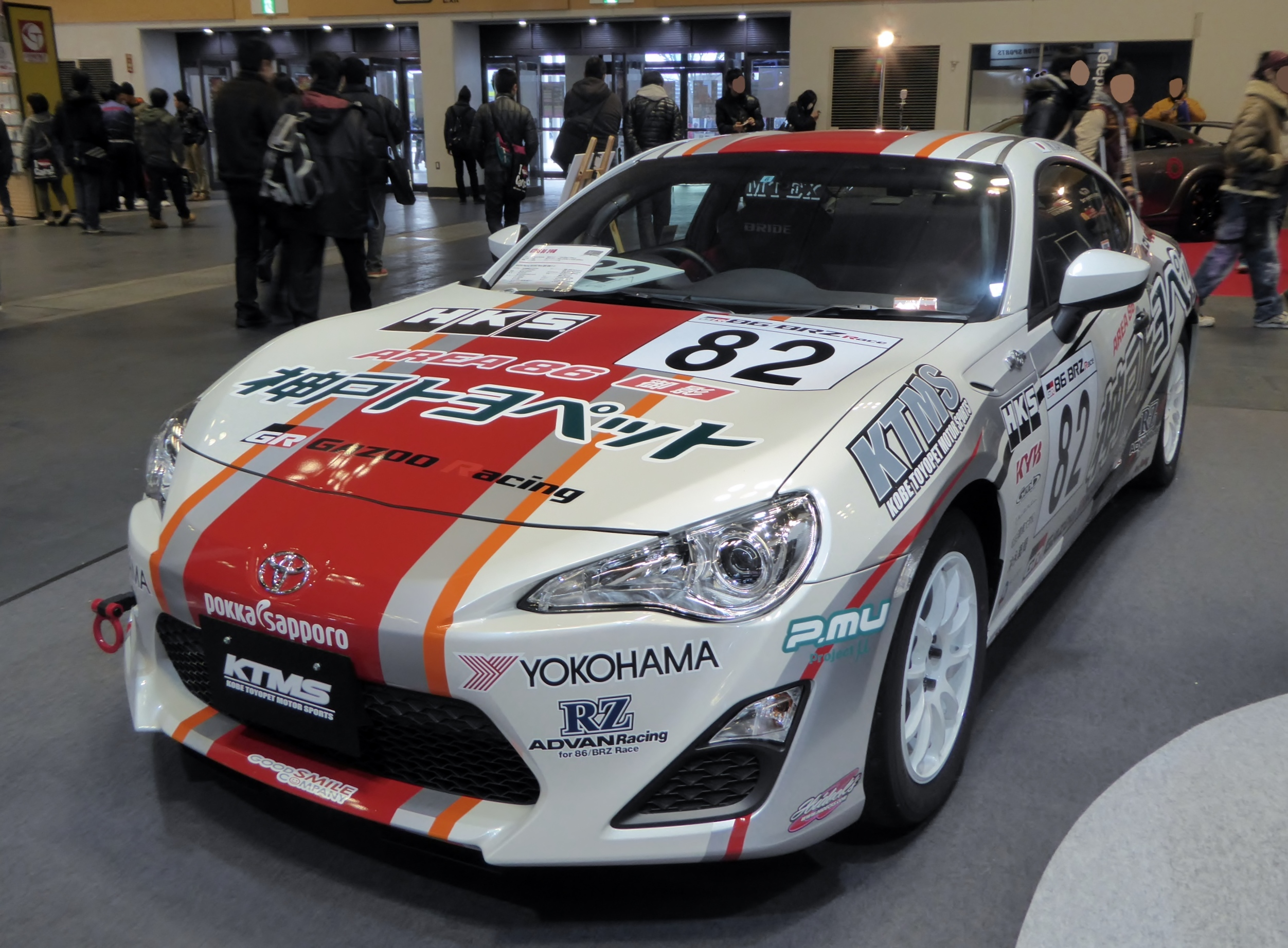 大阪オートメッセ2015において82号車神戸トヨペットKTMS86を撮影。